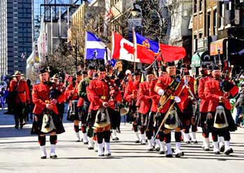 parade 1